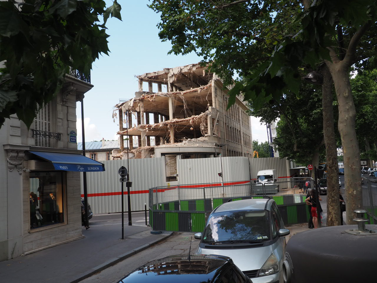 Destruction de locaux administratifs afin de construire le futur centre orthodoxe du Quai Branly